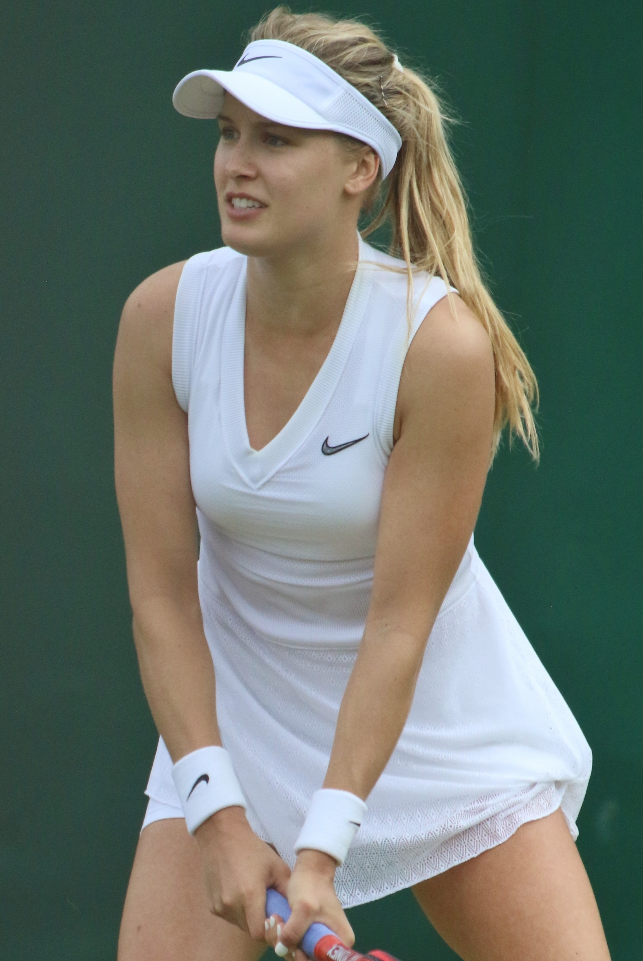 Bouchard WM19 (8)